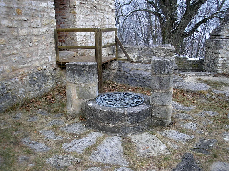 Burg Treuchtlingen (Obere Burg, Landkreis Weißenburg-Gunzenhausen, Mittelfranken). Mittelalterliche Zisternenanlage in der Hauptburg. Eigene Aufnahme, Dez. 2007 / Treuchtlingen castle (Upper castle, Middle Franconia, Bavaria, Germany). Medieval cistern at the central castle. Own photo, Dec. 2007